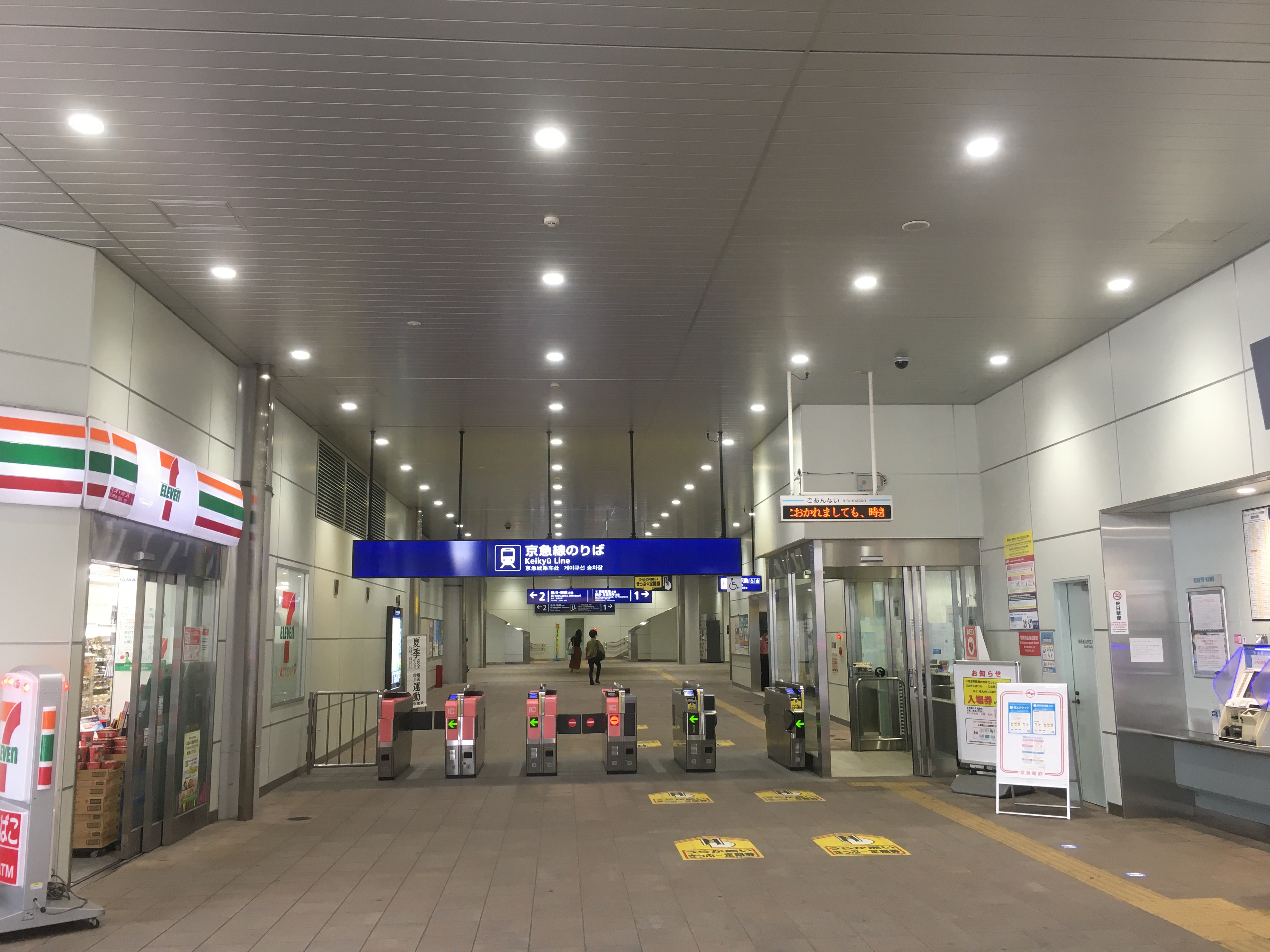 大森町駅 (Ōmorimachi Station)